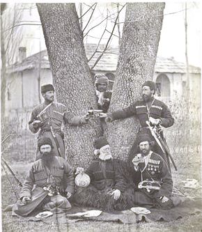 იმერლები Image Title: Kavkaz. Imeretiny. Alternate Title: Caucasus: The Imeretians